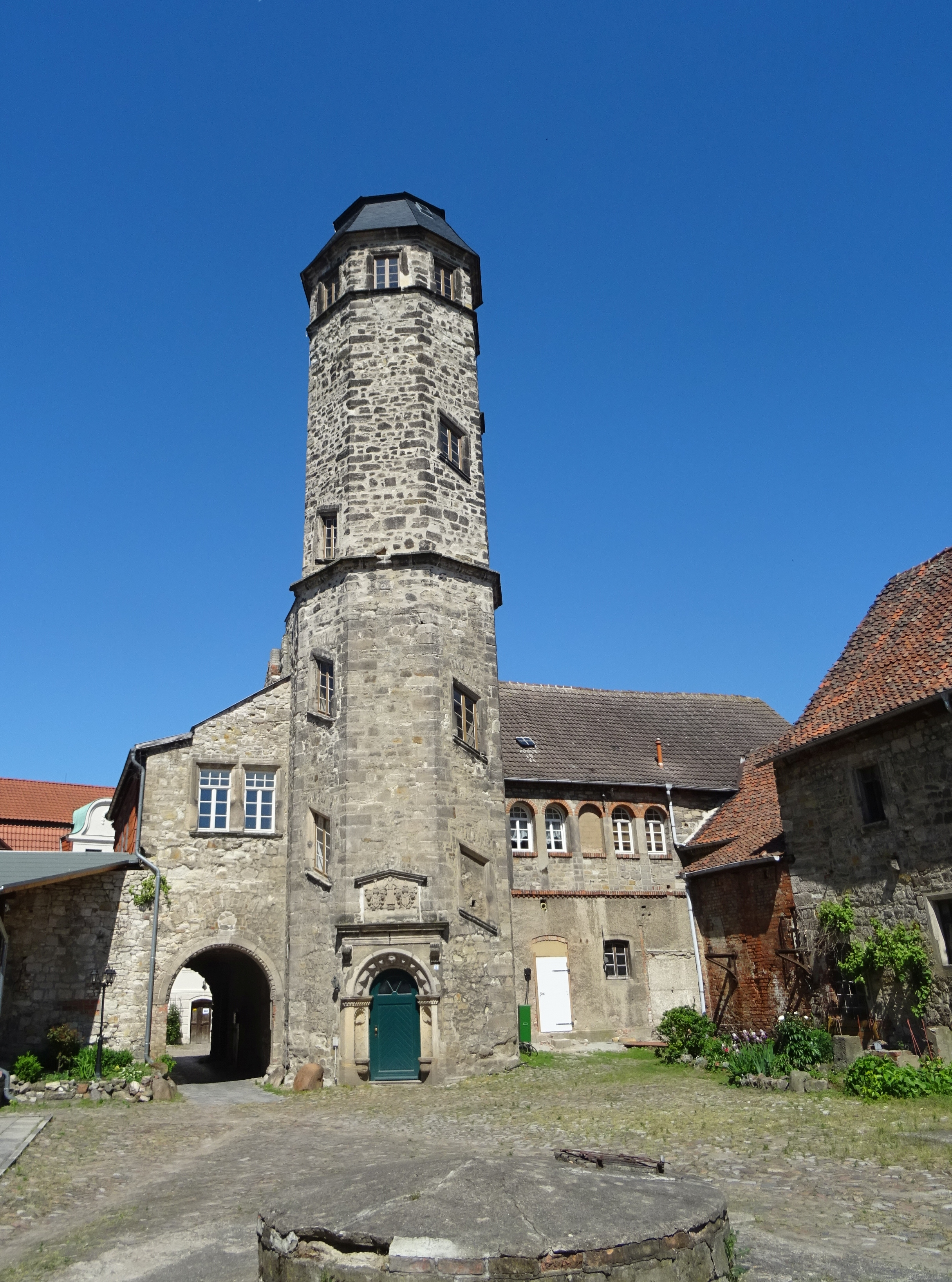 Schloss Ampfurth, Turm und Brunnen